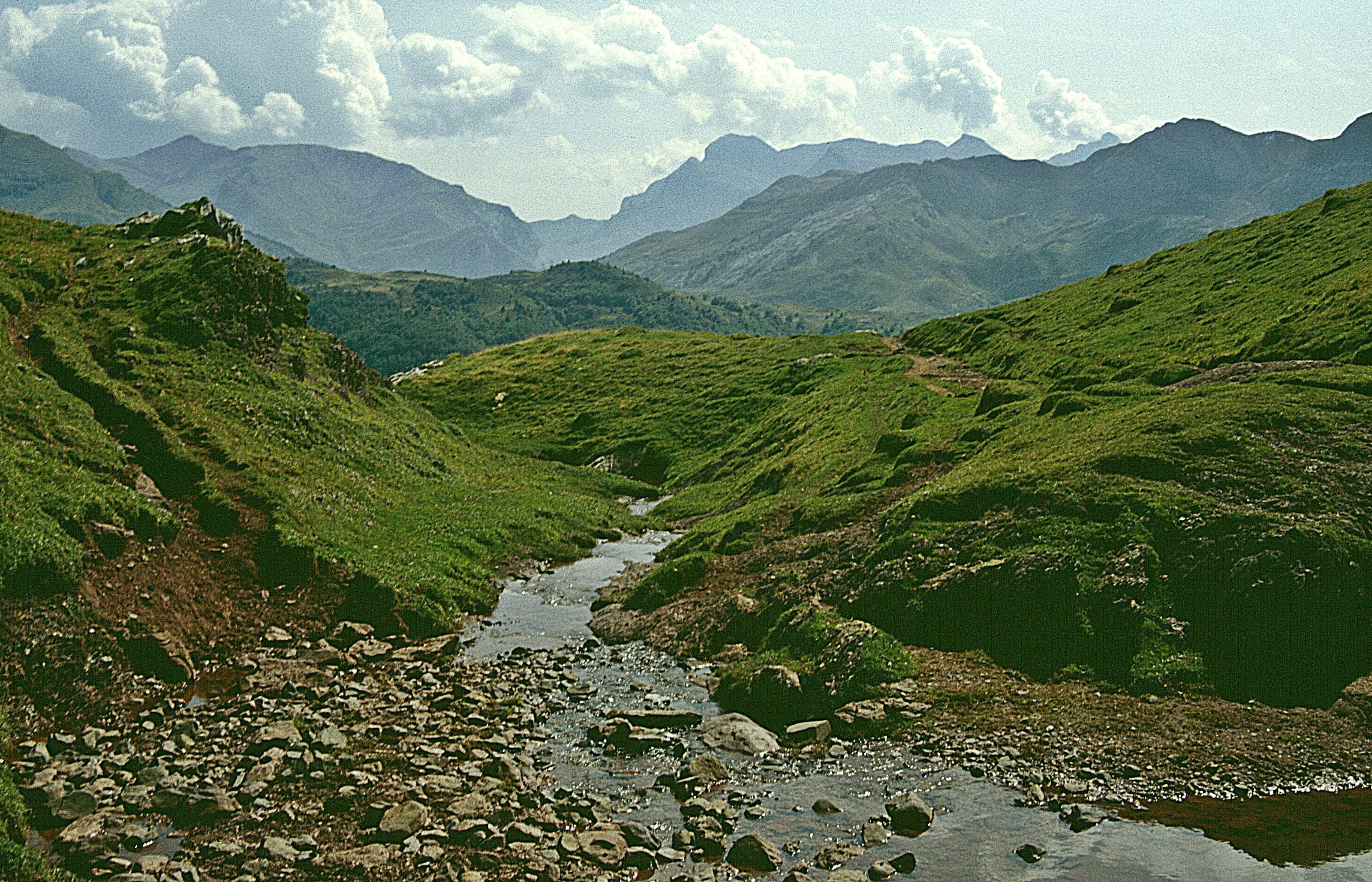 Vallée d'Aspe